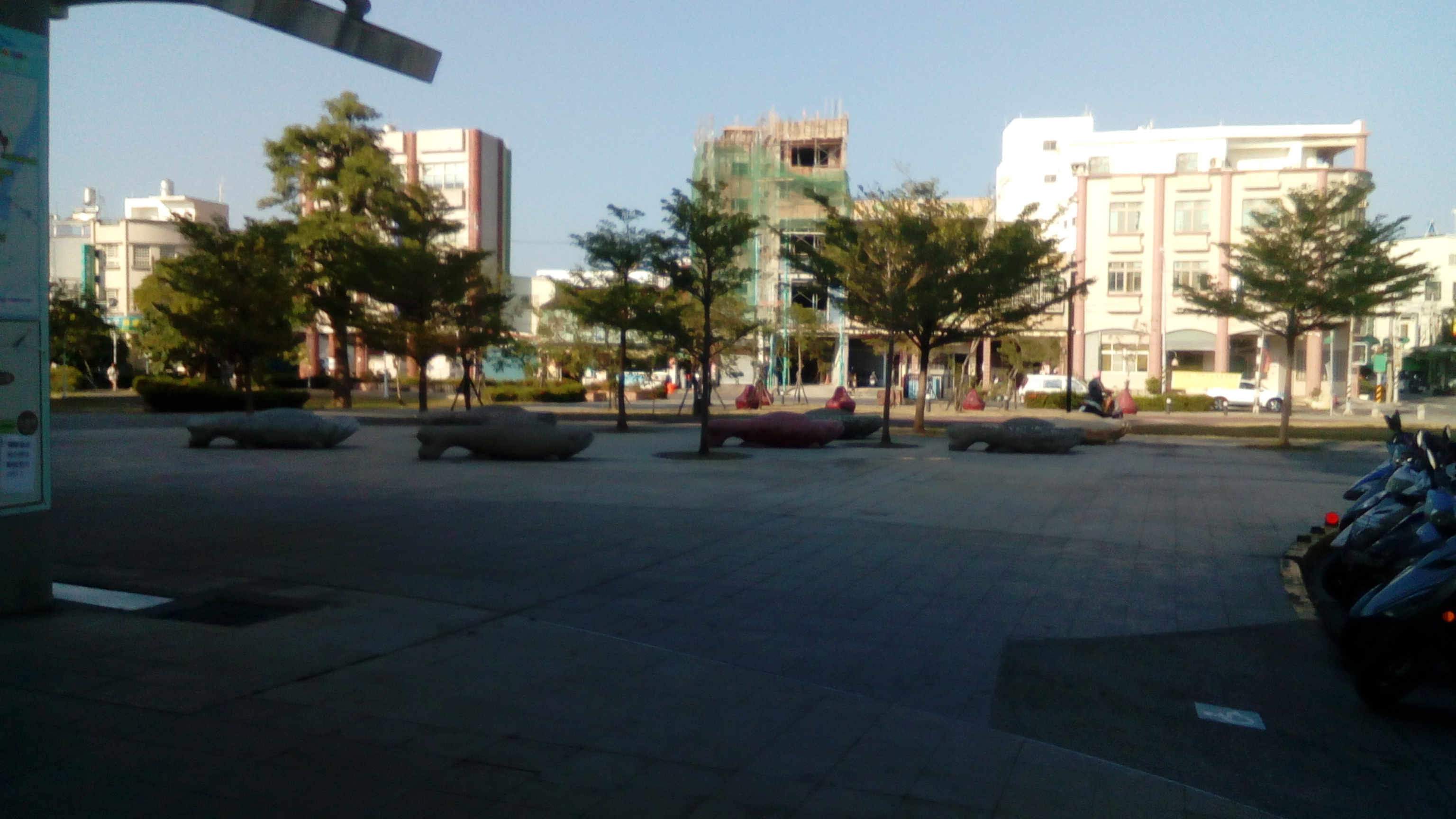 林邊高架火車站